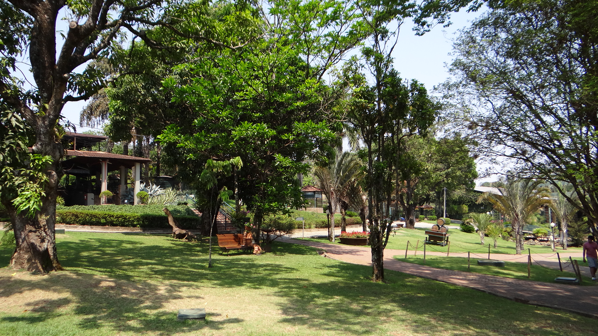 Visão geral do Parque